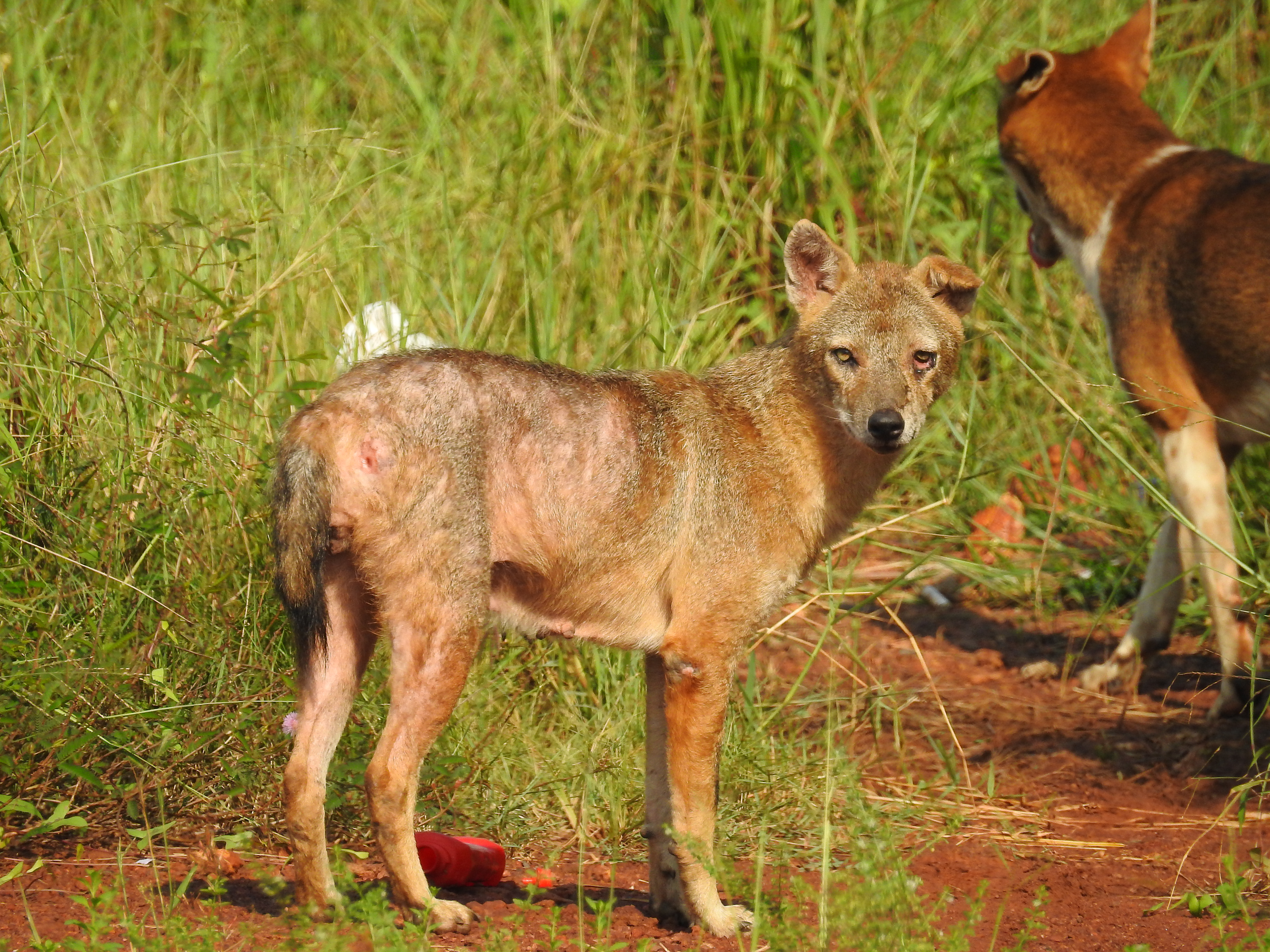 കണ്ണൂർ